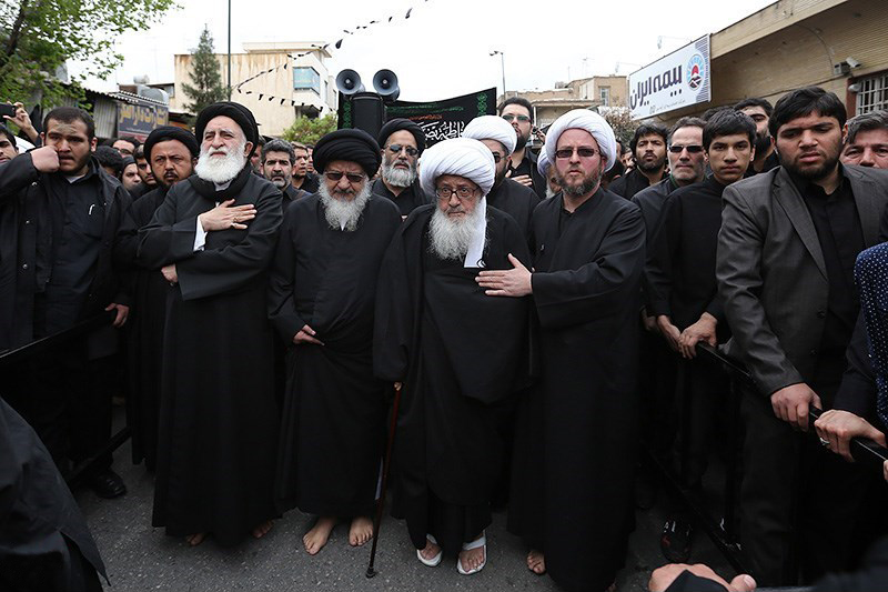 پیاده‌روی مراجع قم به‌مناسبت عزاداری درگذشت فاطمه زهرا در ایام فاطمیه، قم-نوروز 1393